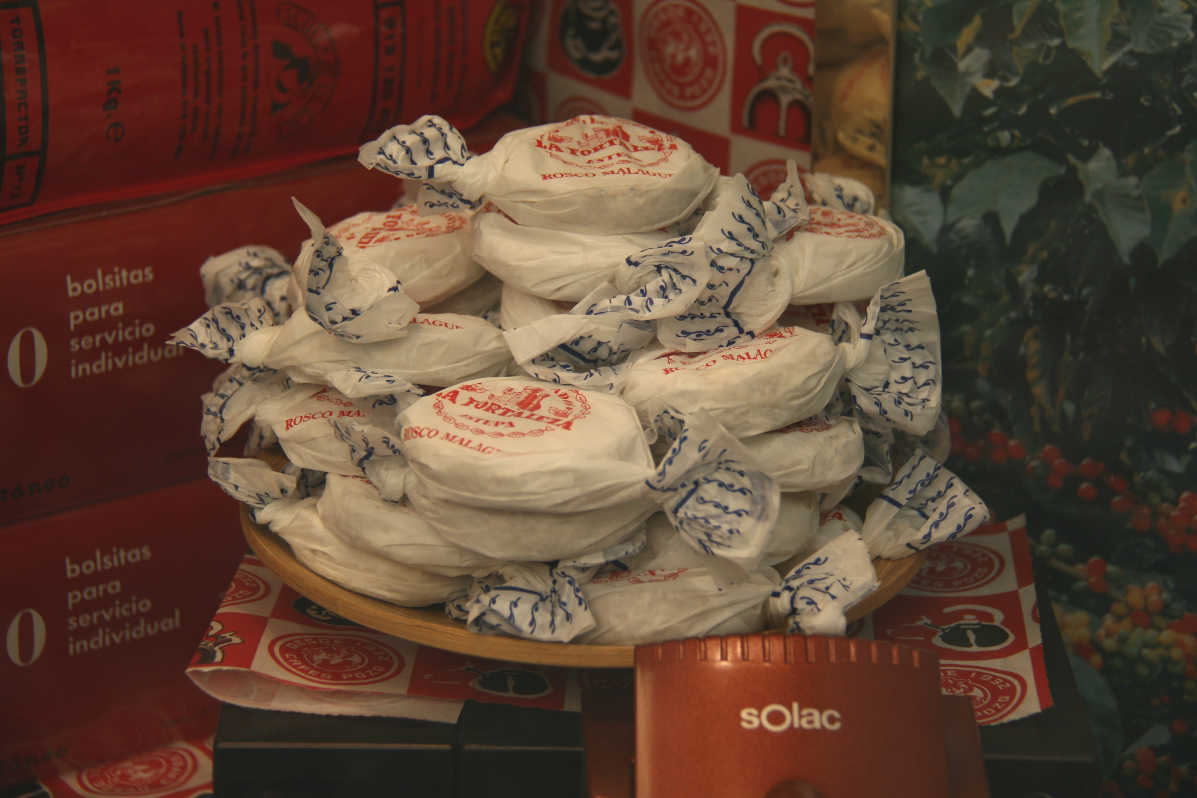 Polvorón - dulce navideño